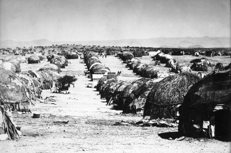 Große Werft (Siedlungshügel) in Windhuk